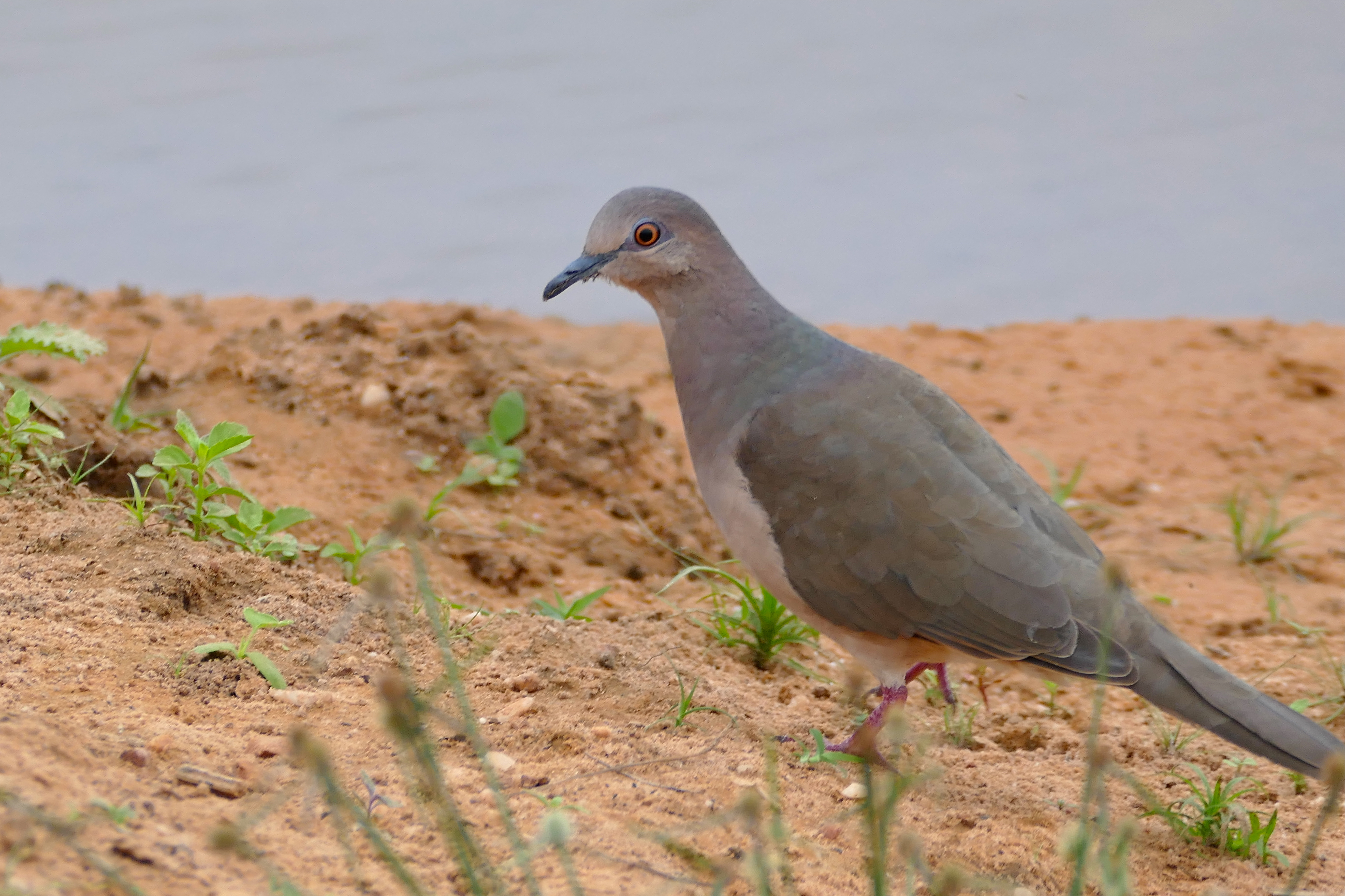 Transpantaneira, Poconé, Mato Grosso, BRAZIL